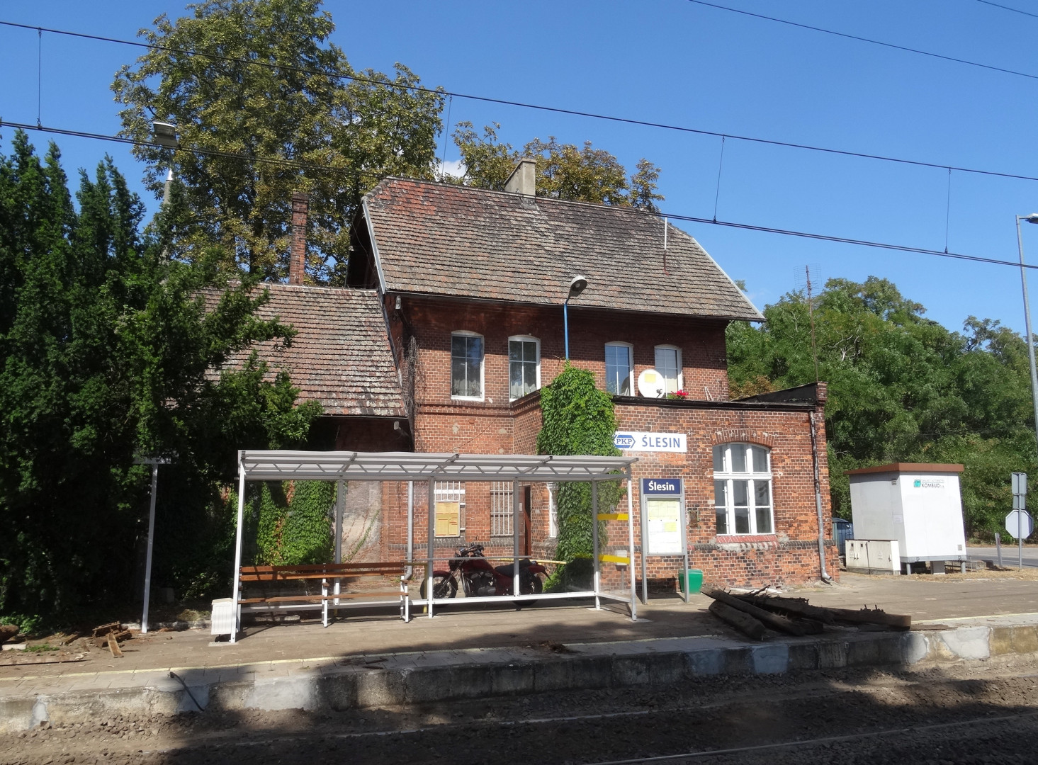 Przystanek kolejowy w Ślesinie, gm. Nakło nad Notecią